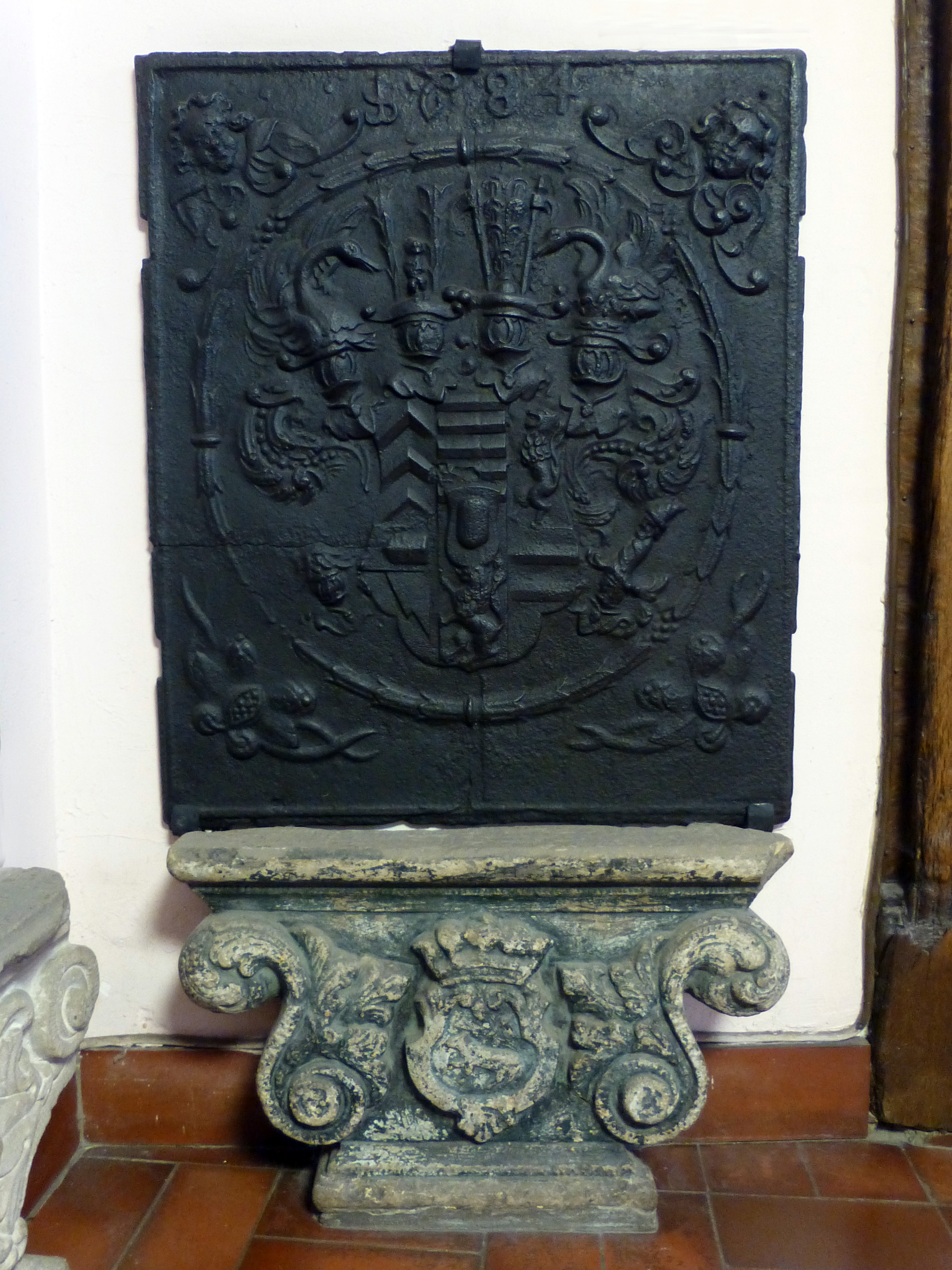 Plaque de fourneau frontale. H : 63 cm ; l : 63 cm. Armoiries des comtes de Hanau-Lichtenberg Datée : 1684 Fonderie de Zinswiller. Musée alsacien de Haguenau (Bas-Rhin) N° d'inventaire : 2013.0.82 CP